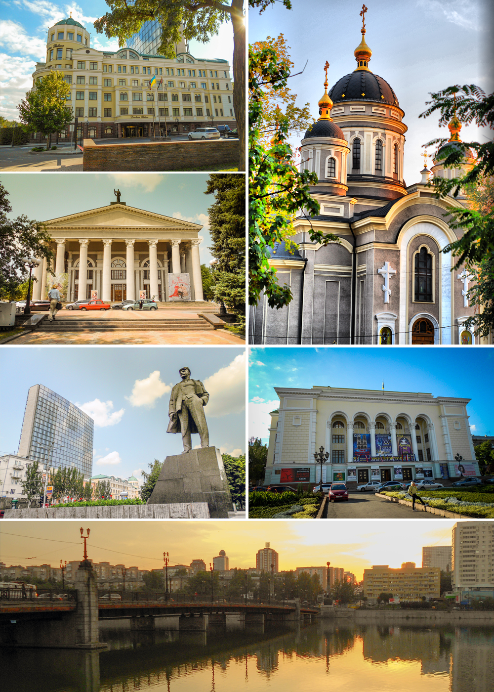 Достопримечательности Донецка